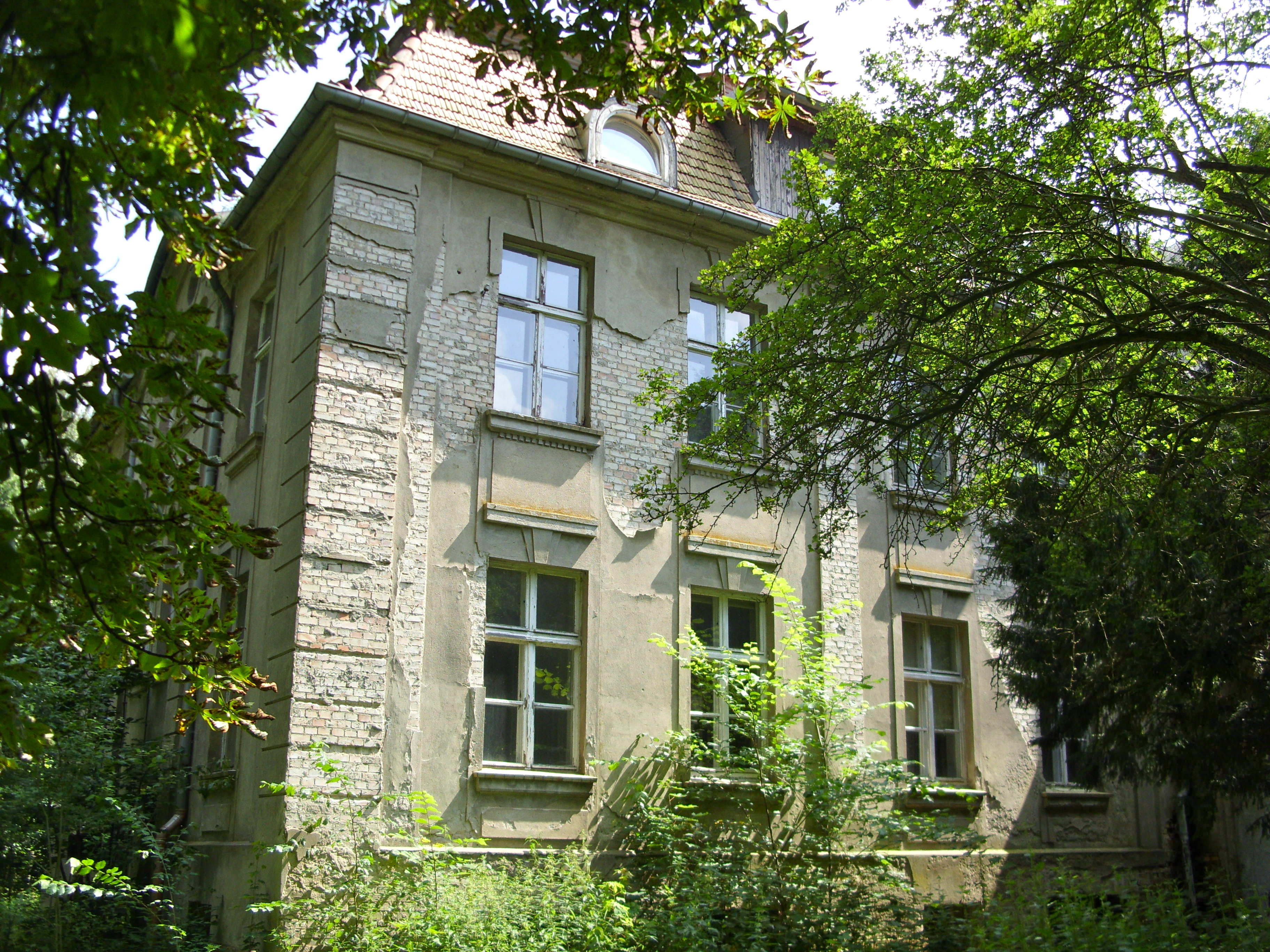 Kummerow, Schloss im Dornröschenschlaf